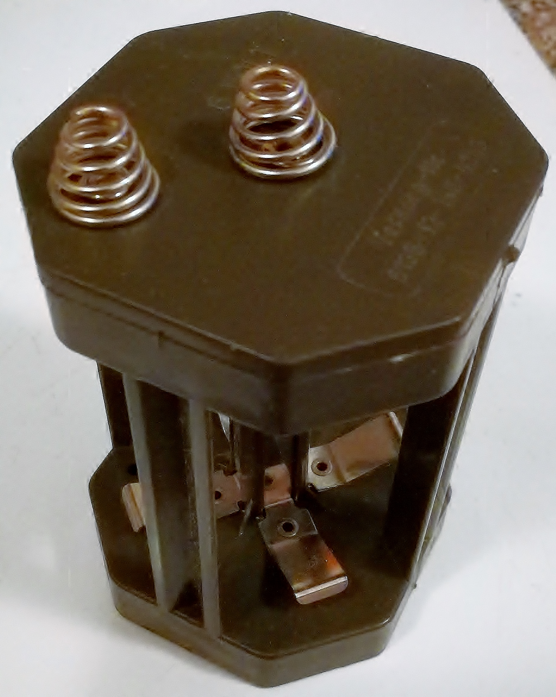 Laternenbatterie-Adapter für 4 Monozellen